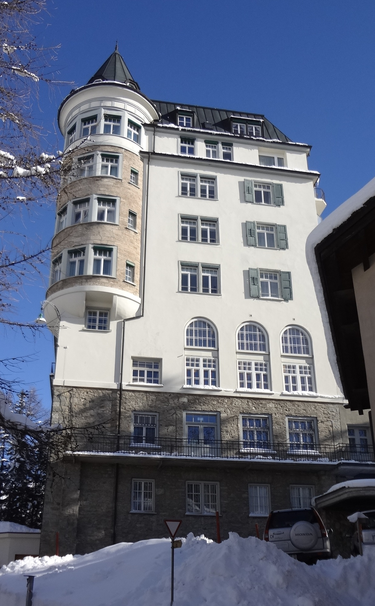 Tour Nord-Ouest de l'Hôtel Waldhaus de Sils-Maria